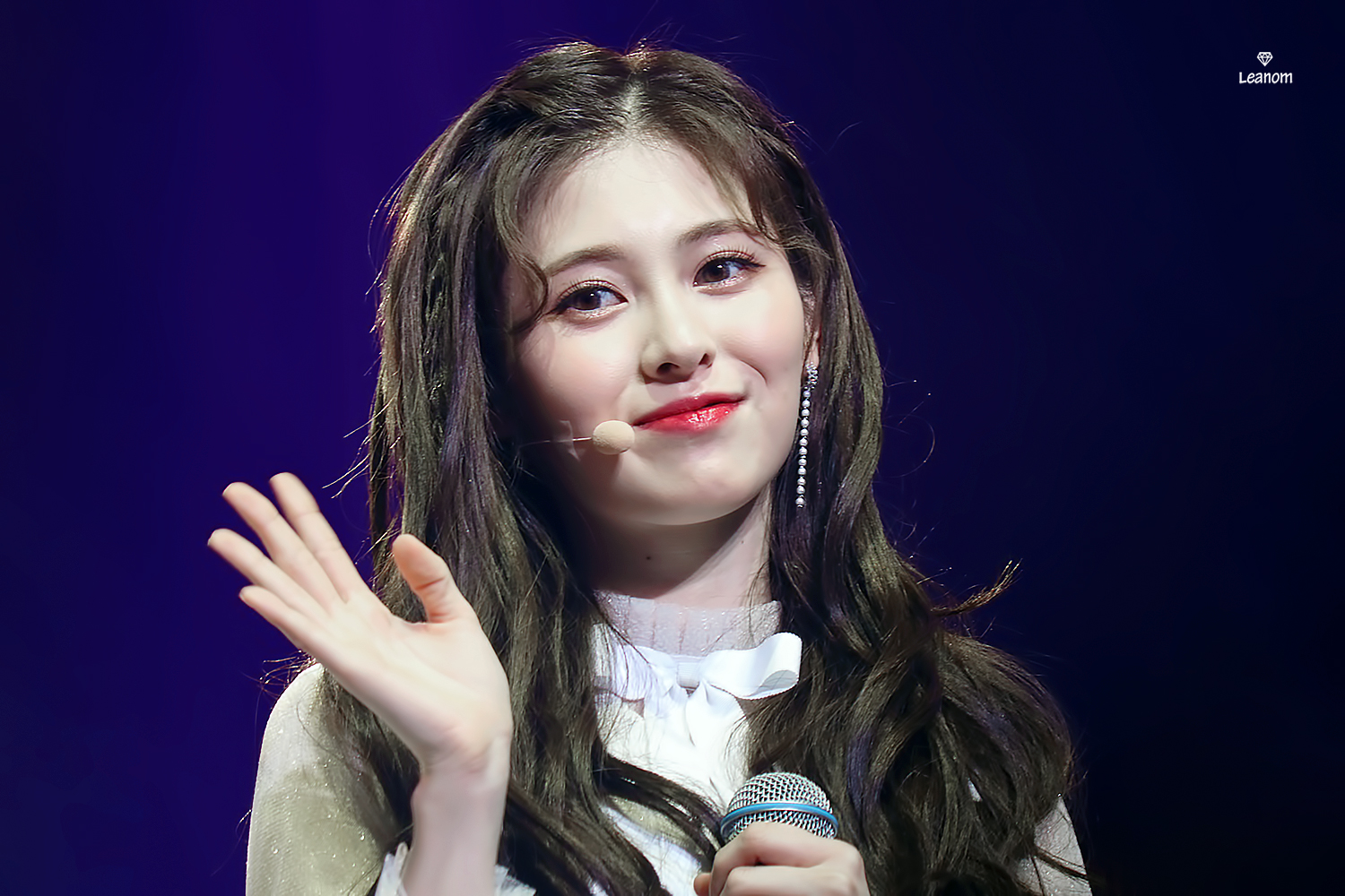 180303 유니티 팬미팅